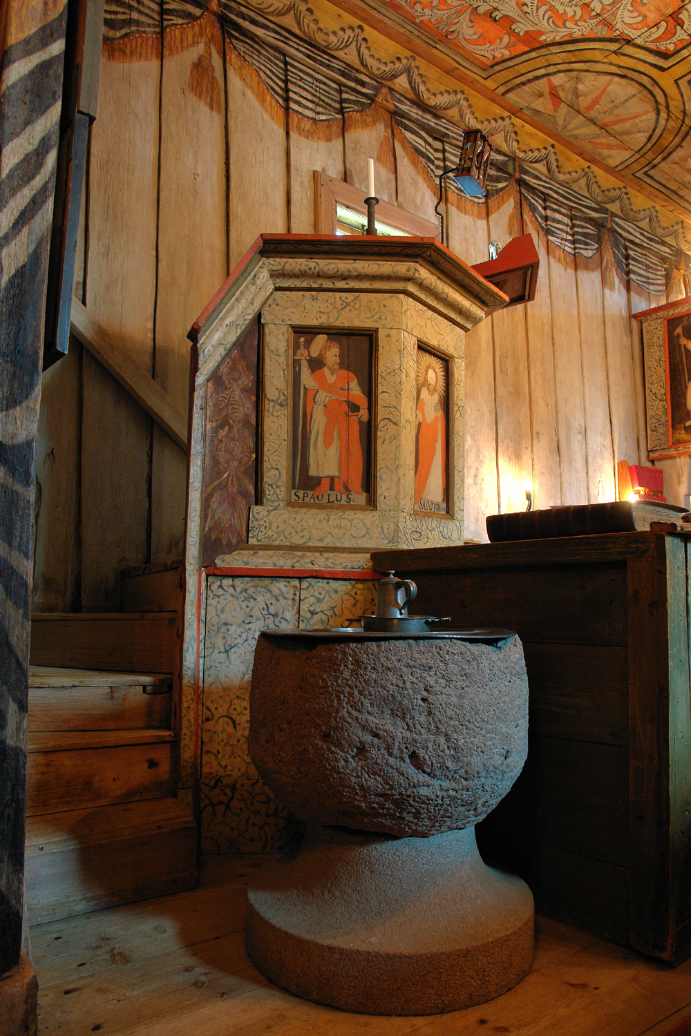 Die Stabkirche Hedared von 1506 ist die einzige erhaltene mittelalterliche Kirche dieser Bauart in Schweden. Taufbecken aus dem 12. Jh.